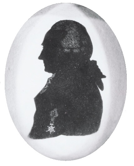 Portret van Johannes Theodorus Rossyn (1744-1817), anoniem.